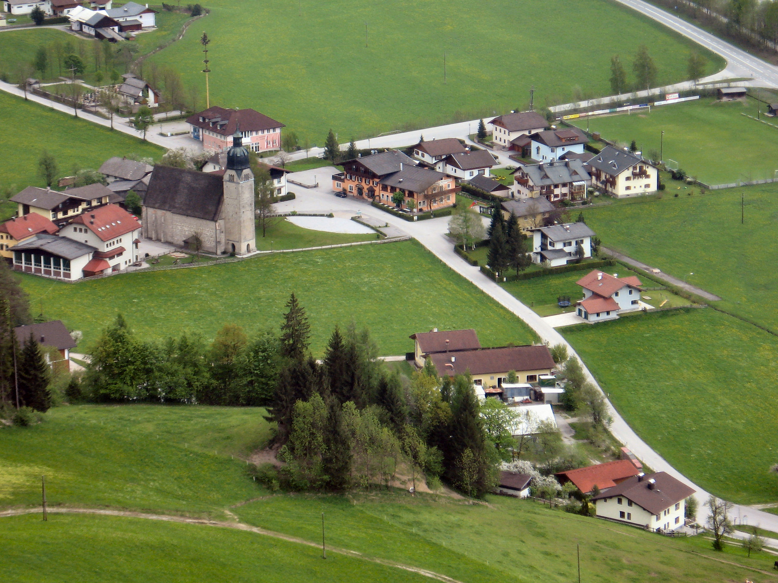 Scheffau am Tennengebirge - vom Mehlstein gesehen II